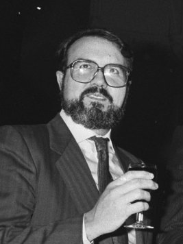 Reunión España, Portugal, Amsterdam. Embajadores, Ruud Lubbers Pedro Solbes.